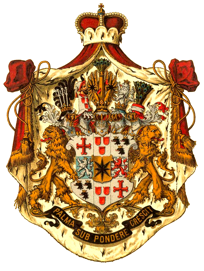 Wappen des Fürstenhauses Waldeck und Pyrmont